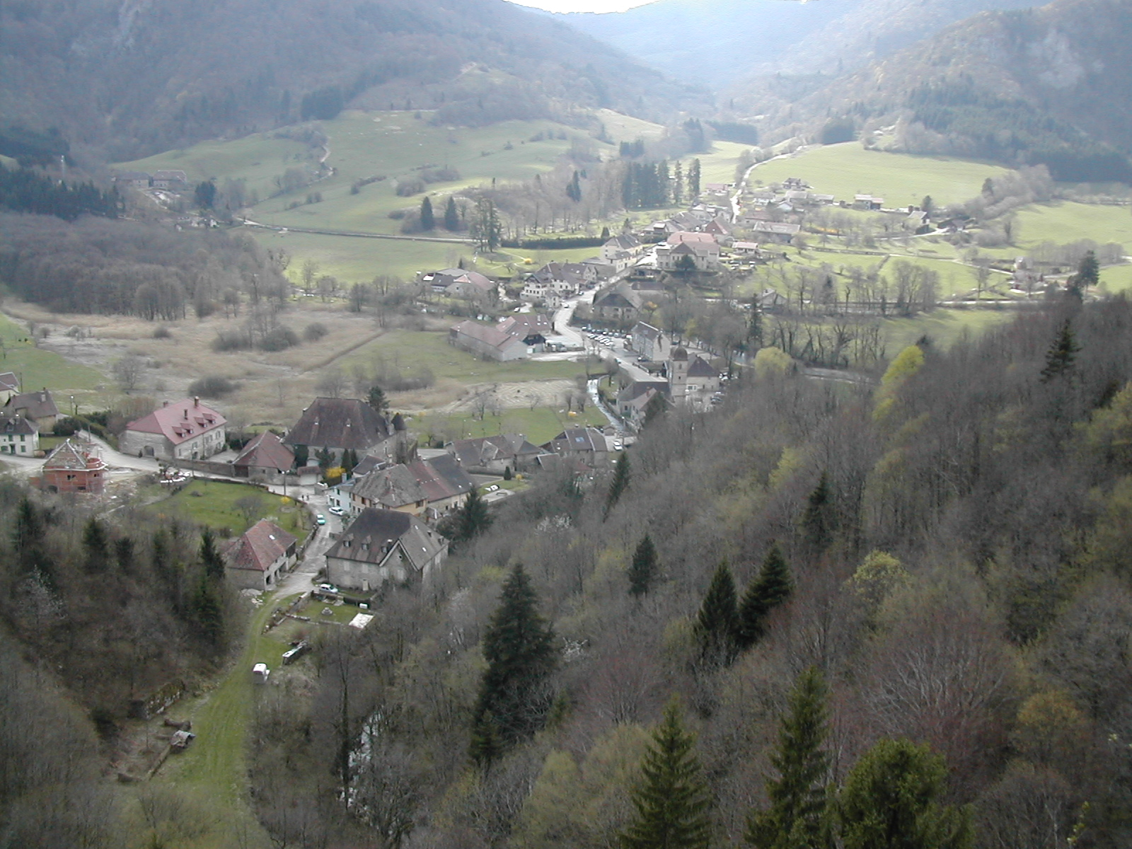 Nans-sous-Saint-Anne. Département du Doubs (25). France. Vue de la Via Ferrata